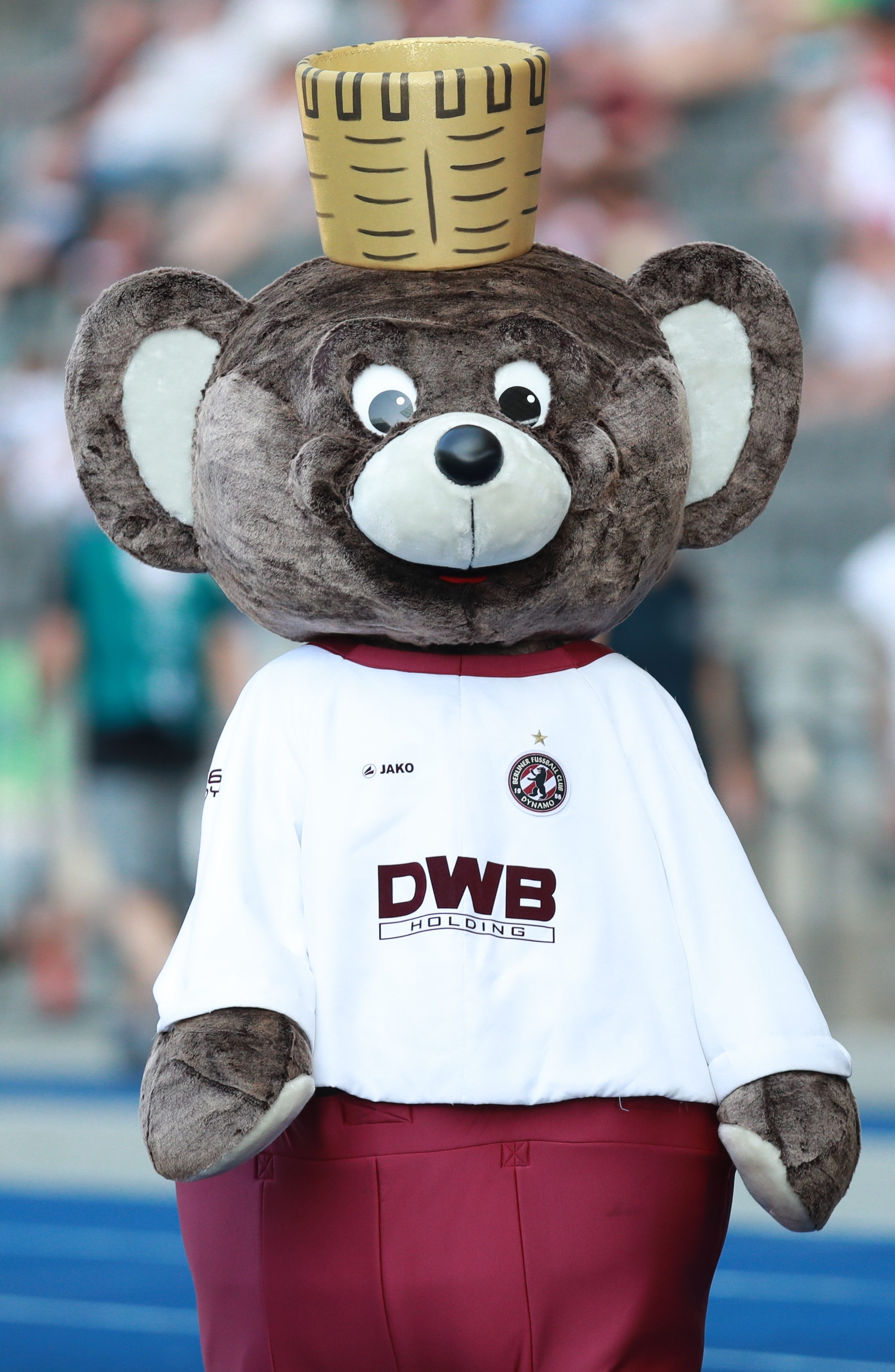 DFB-Pokal 2018/19, 1. Hauptrunde: BFC Dynamo gegen 1. FC Köln 1:9 (1:4)